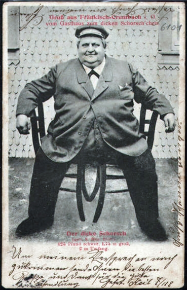 Ansichtskarte aus Fränkisch-Crumbach